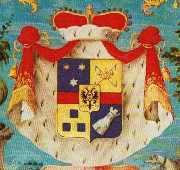 Wappen des Fürsten von Clary und Aldringen (Primogenitur mit Hochgeboren, seit 20. Juli 1905 mit Prädikat Durchlaucht; die Nachgeborenen führen den Namen Graf bzw. Gräfin von Clary und Aldringen: Geviert mit rotem Balken und mit goldenem Herzschild belegt, darin ein gekrönter schwarzer Doppeladler mit österreichischem Bindenschild, darauf ein schwarzes F und über dem Bindenschild ein Erzherzogshut; Feld 1: in Blau drei (2:1) goldene Sterne, Feld 2: in Gold zwei durch eine Blätterkrone gesteckte schwarze Doppelhaken (beide Felder: Aldringen), Feld 3: in Gold drei (1:2) blaue Würfel, Feld 4: in Blau ein schräg-links gestellter silberner Turm (beide Felder: Clary); dazu gehören drei Helme mit blau-silbernen Decken: 1. ein silbern gekleideter Arm mit zwei gekreuzten, wie Felder 3 und 1 bezeichneten Fahnen in der Hand, 2. der Doppeladler des Herzschildes, 3. ein silbern gekleideter Arm mit dem Bild aus Feld 2 in der Hand; Fürstenhut und -mantel.